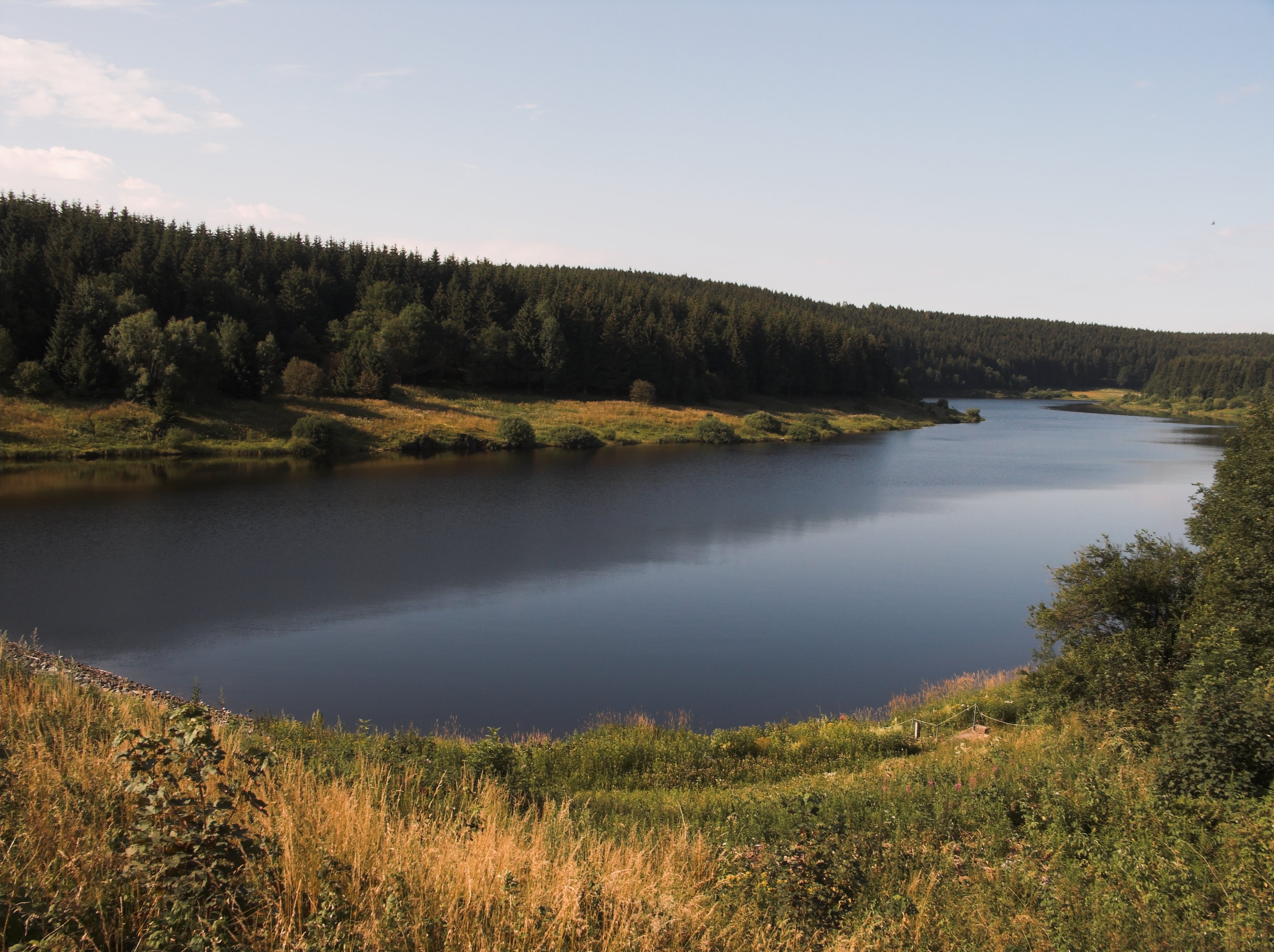 Mandelholztalsperre